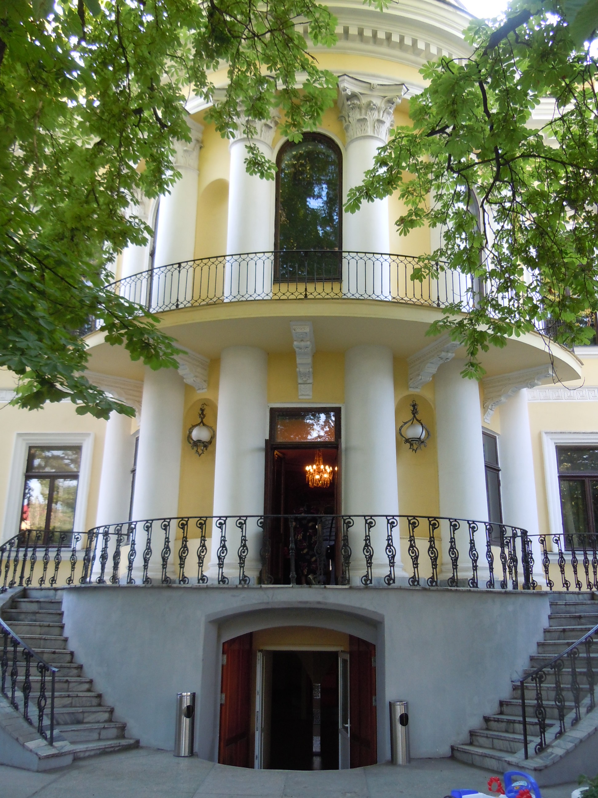 Вигляд палацу Толстих з саду